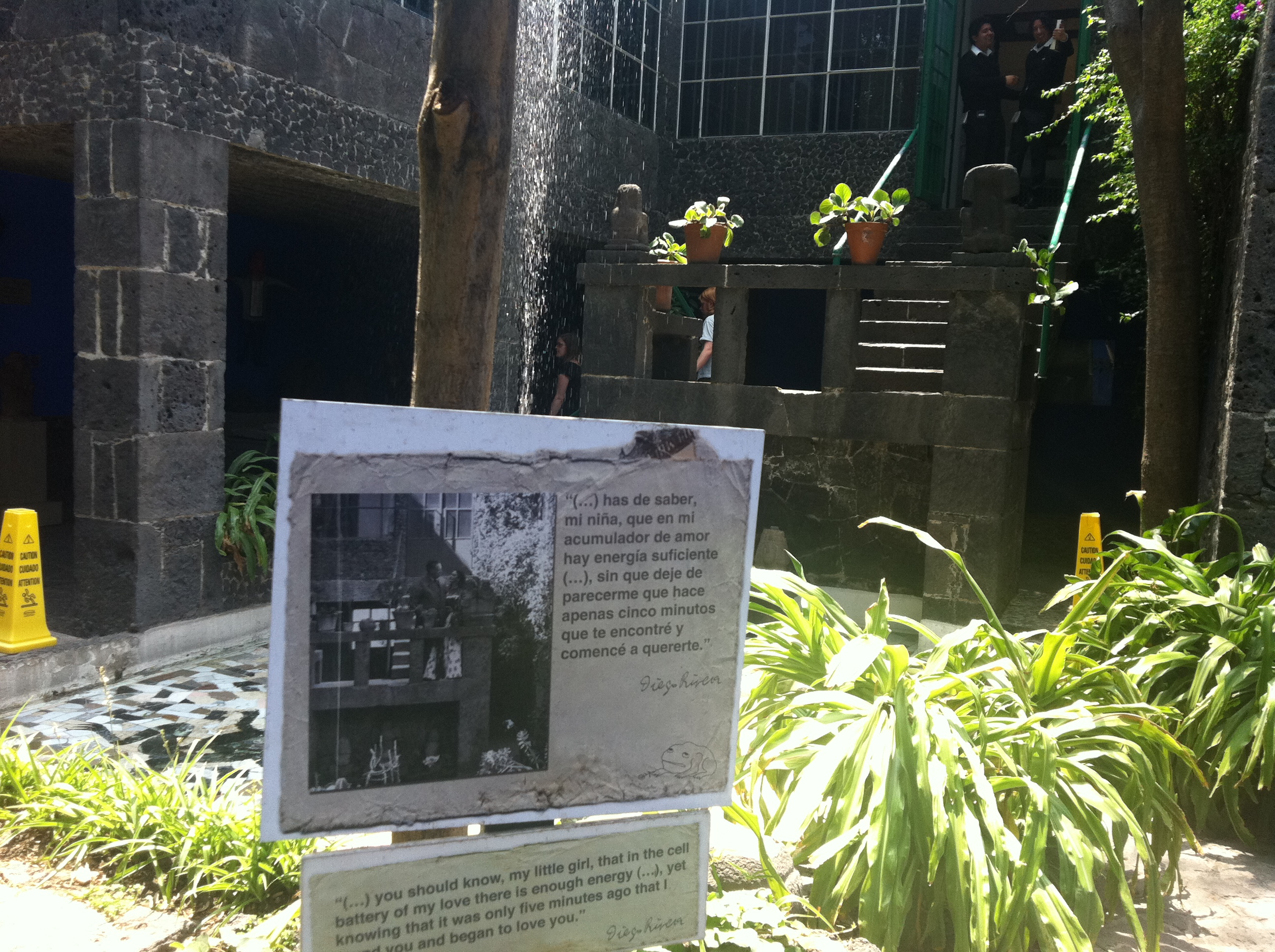 Diego Rivera